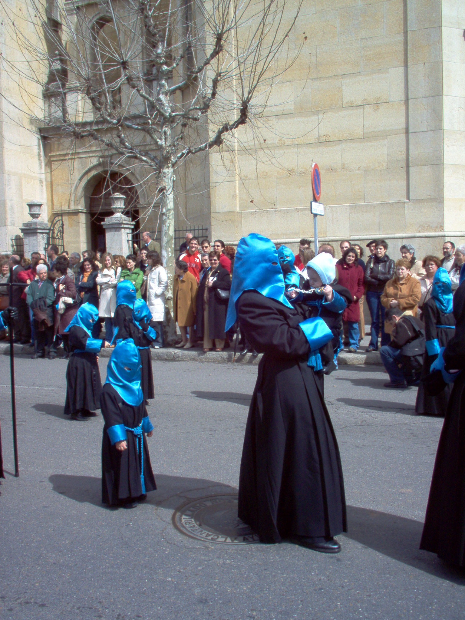 Papones de la Cofradía del Santo Cristo de la Bienaventuranza (León, España), durante la procesión de las Bienaventuranzas de 2005, el Jueves Santo. Pequeños y mayores viven la Semana Santa de León.